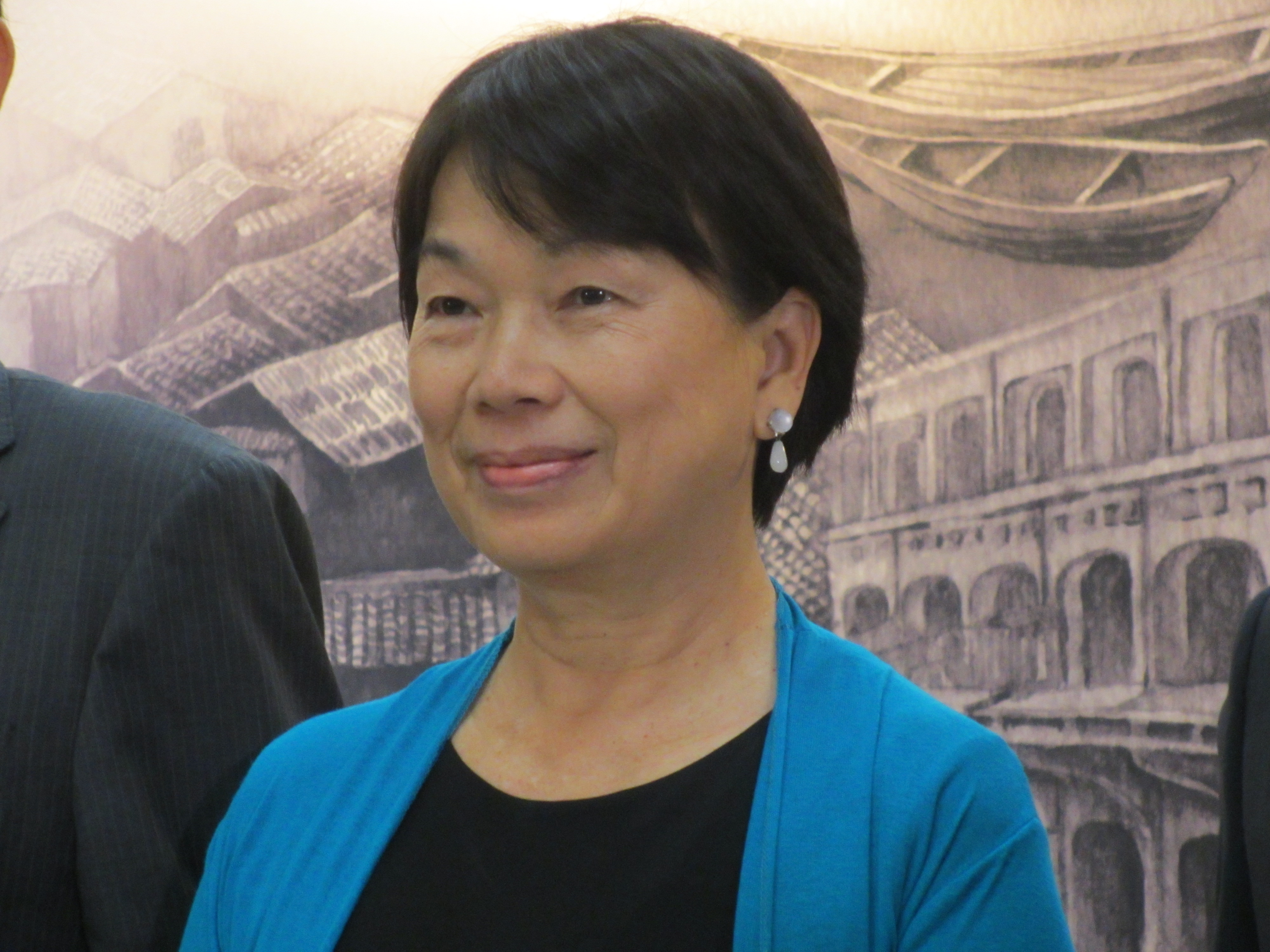 Lung Ying-tai